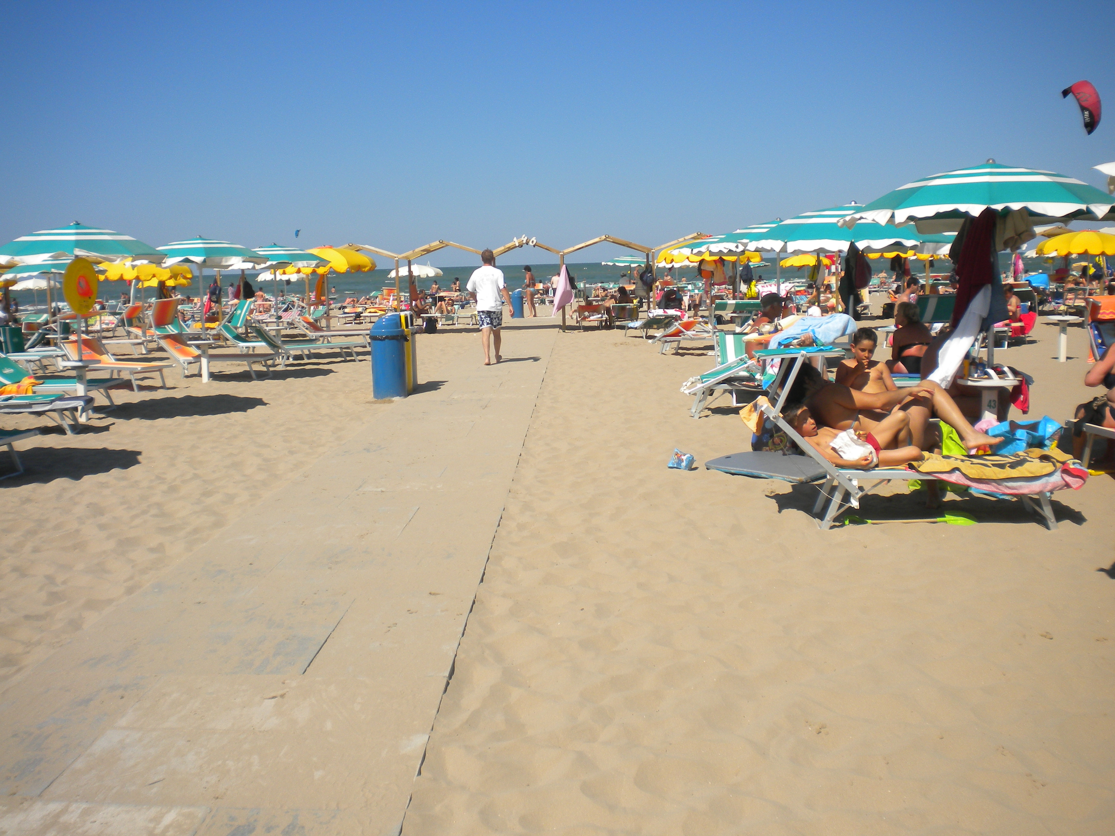 bagno 186 con le nuove bellissime tende